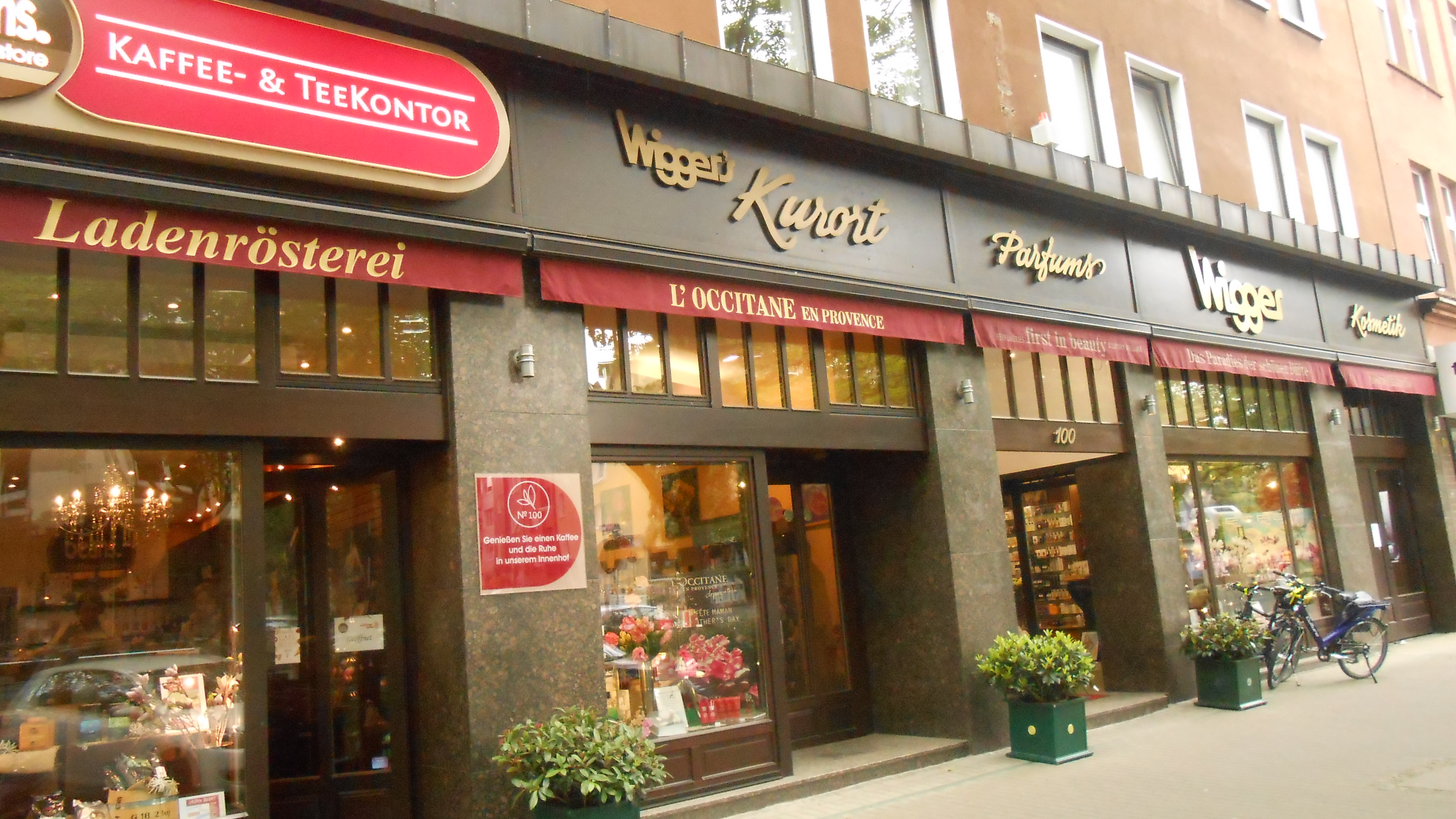 Ladenzeile mit kleinen speziellen Läden in der Kaiserstraße, in der östlichen Innenstadt in Dortmund.